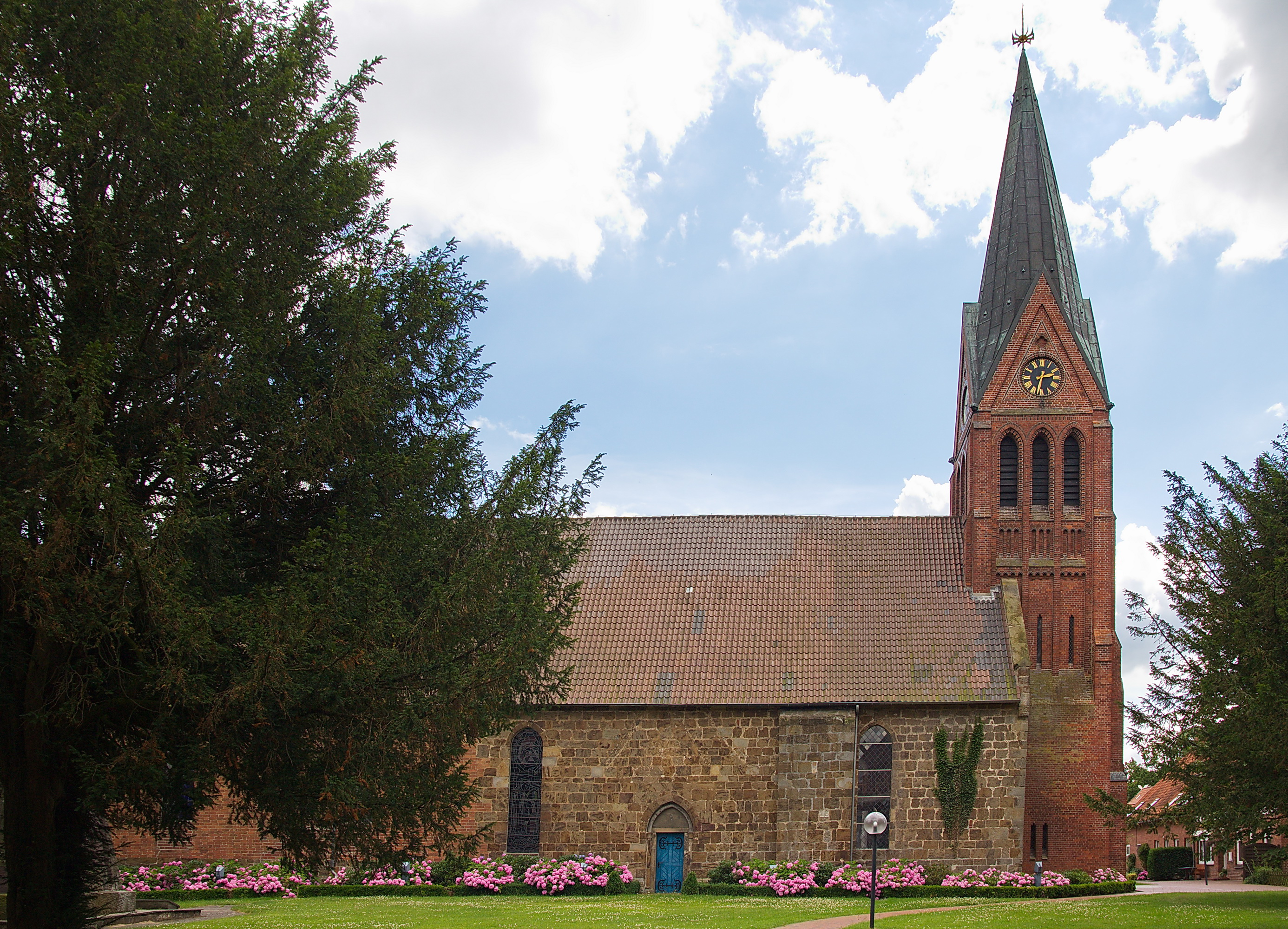 St. Cosmae und Damiani-Kirche in Dörverden, Niedersachsen, Deutschland.